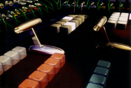 Mélangeur vidéo. Image réalisée en images de synthèse 3D, avec le logiciel Softimage./// Video mixer, 3D computer graphics image.